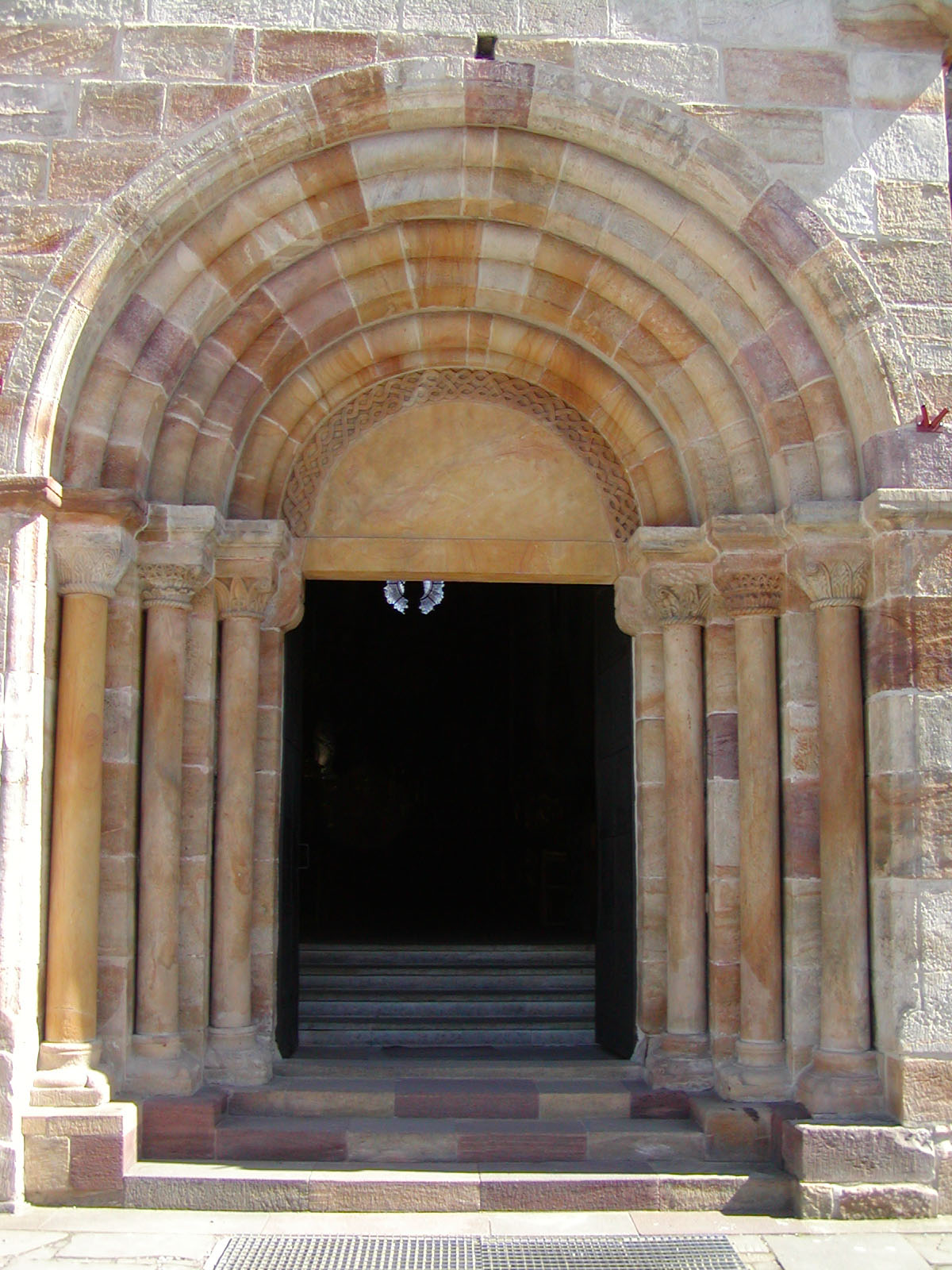 Sulejów Monastery